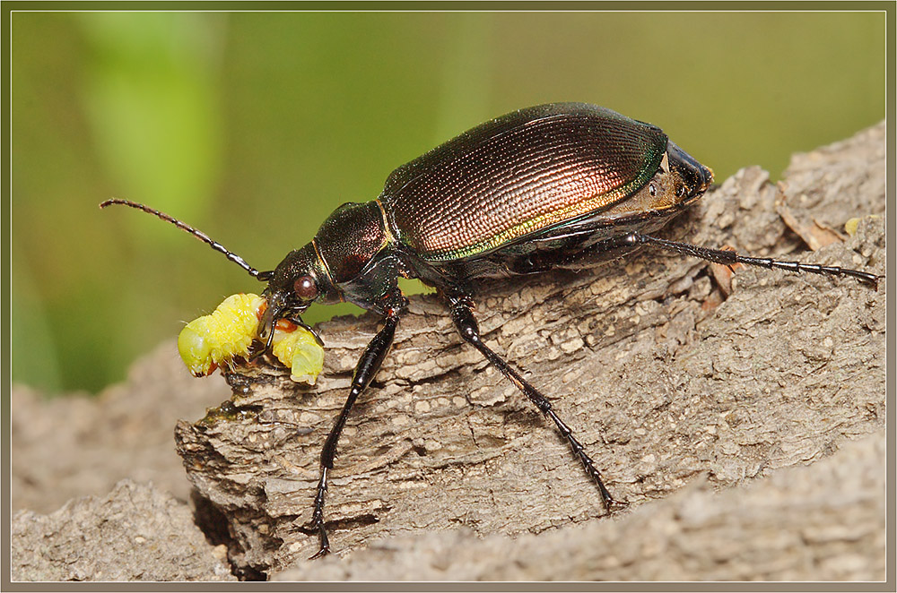 Красотел бронзовый, поедающий гусеницу. Волгоградская обл., пойма реки Волга